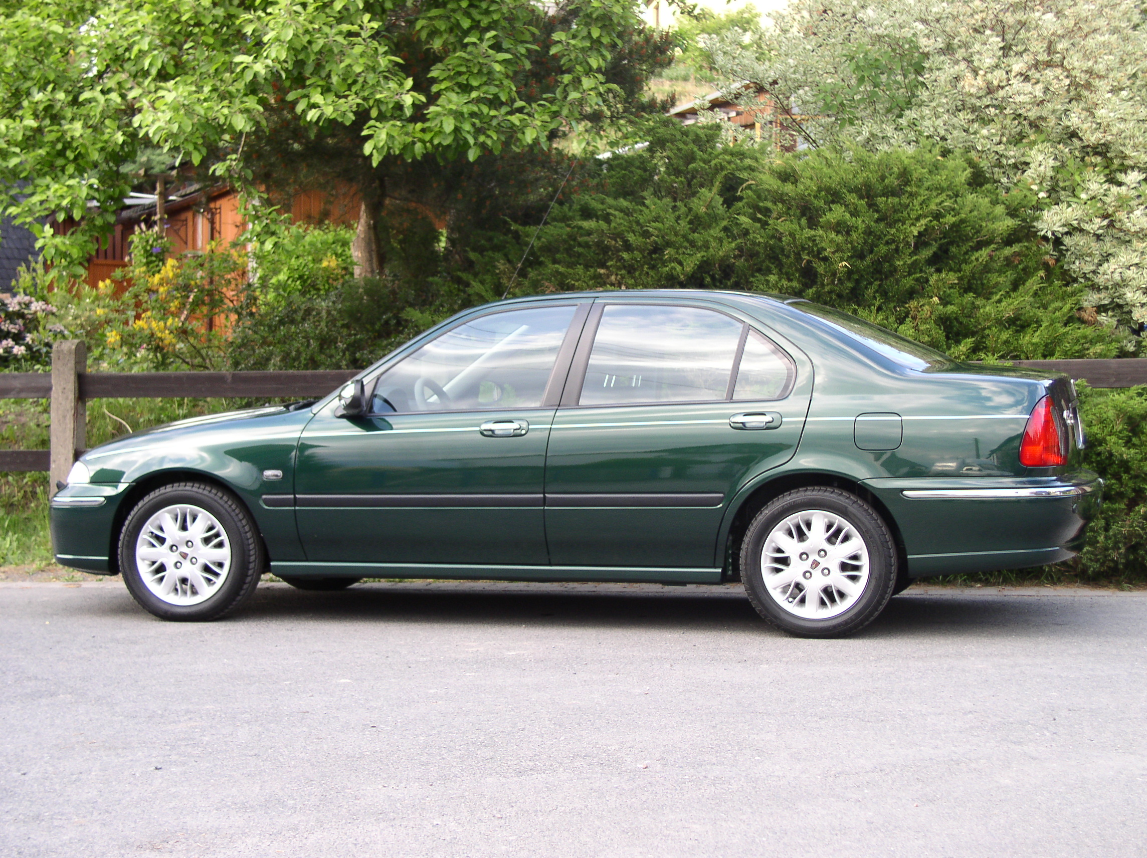 Rover 45 Baujahr 2003 1,8 L Seite Celeste